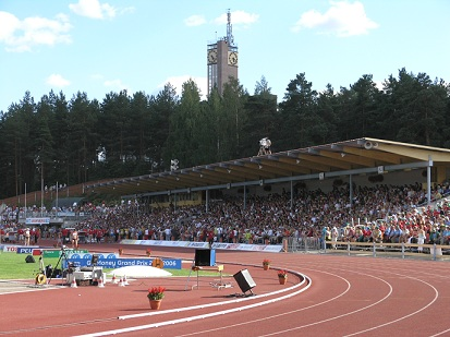 Harjun kenttä